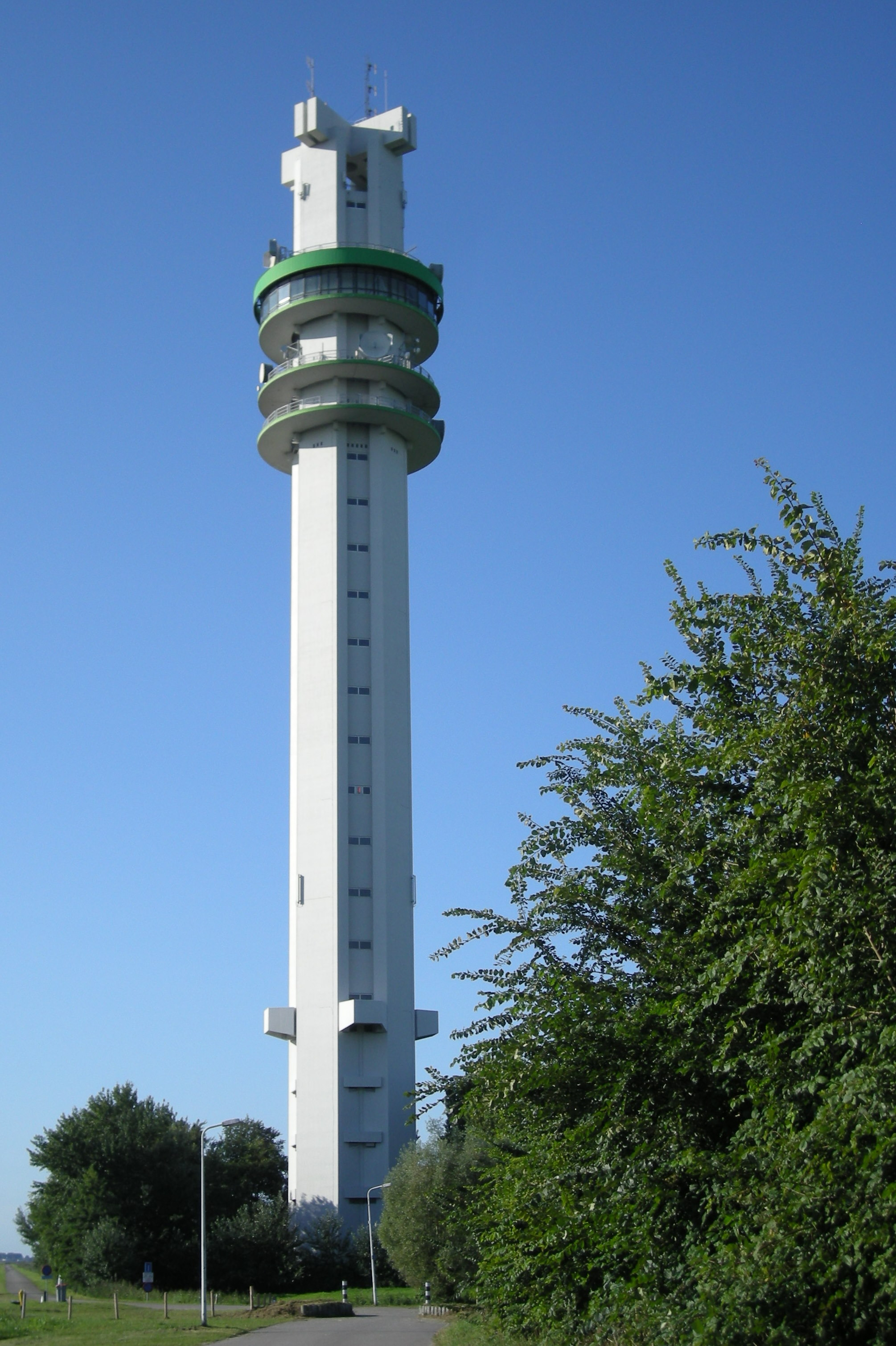 Toren van Spannenburg